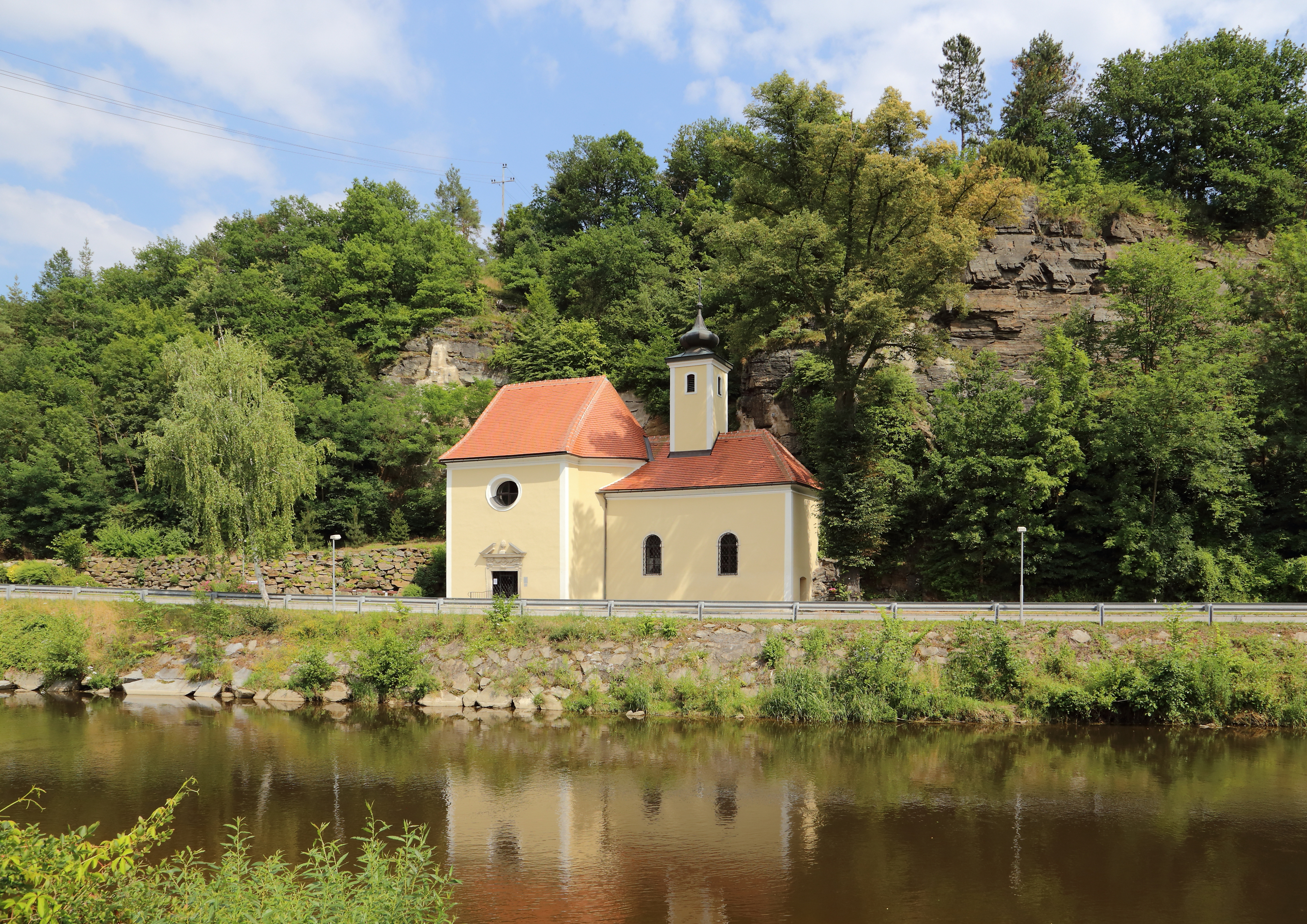 Bründlkapelle in Kamegg, ein Ortsteil der niederösterreichischen Marktgemeinde Gars am Kamp. Die an einer Felswand an der Kamptalstraße liegende Kapelle wurde um 1650 errichtet und um 1700 erweitert.